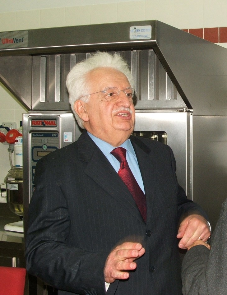 Lo scrittore, giornalista, attore e presentatore Bruno Gambarotta ad una manifestazione pubblica a Mondovì, Piemonte